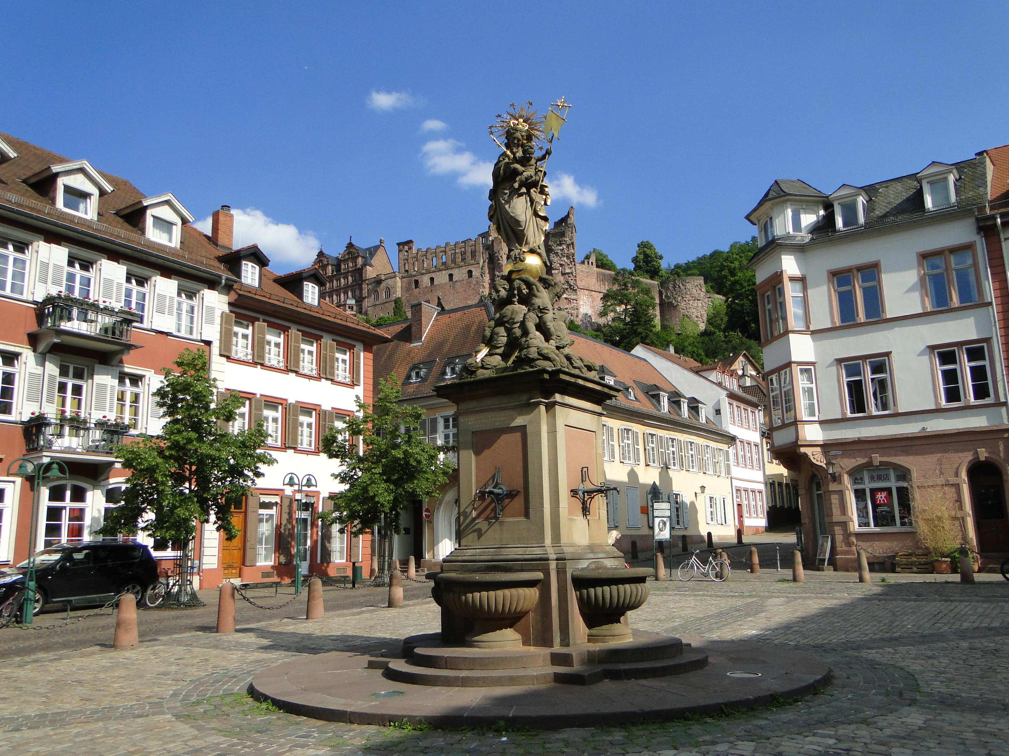 Heidelberg